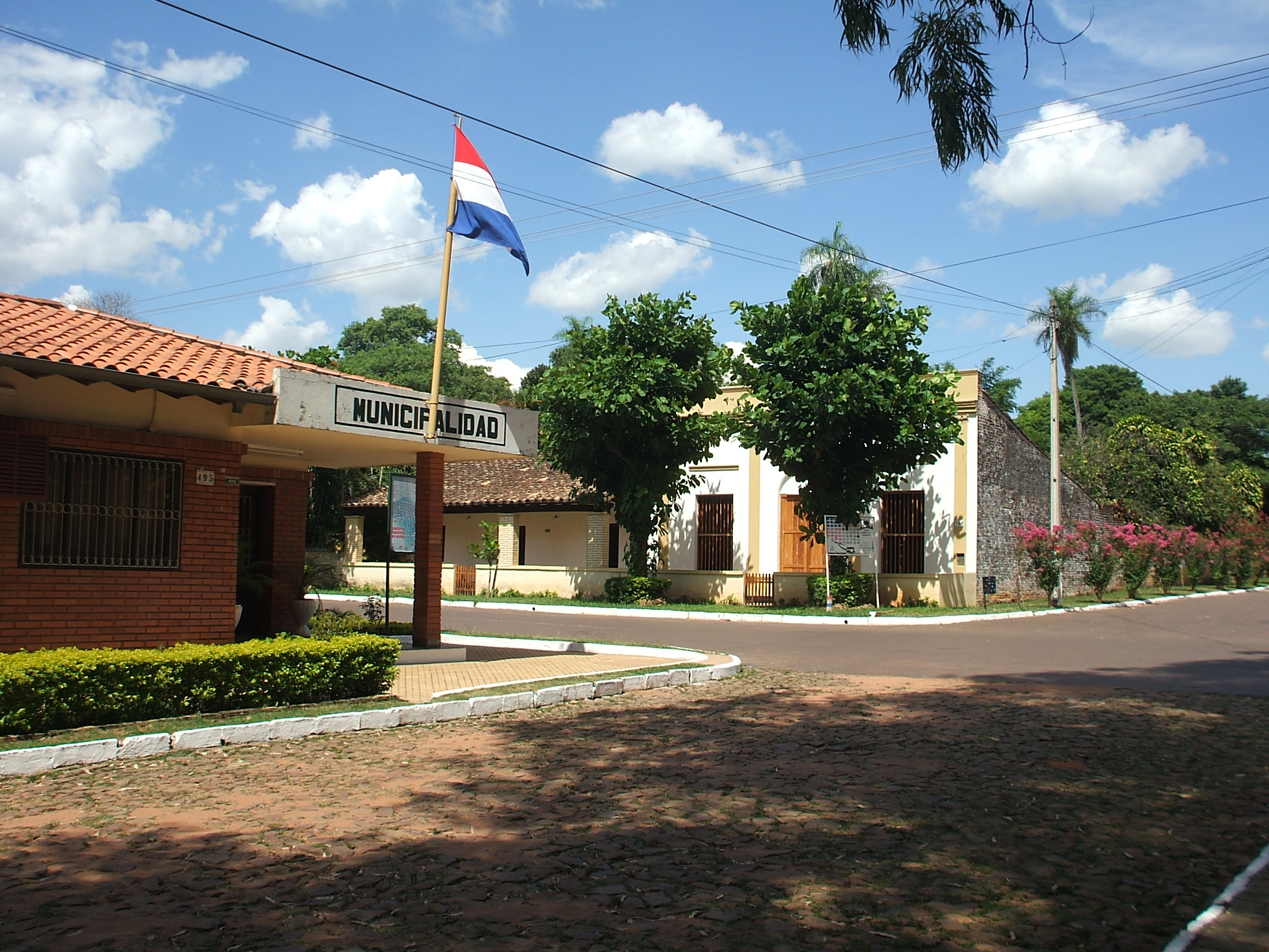 Municipalidad de Atyra